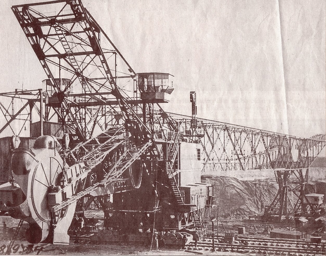 Die erste Abraumförderbrücke der Welt (mit Schaufelradbagger vorne) in der Grube Agnes in Plessa